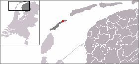 Kaart met de locatie van Oost-Vlieland, gemaakt uit sjabloon van Wikipedia-gebruiker Mtcv